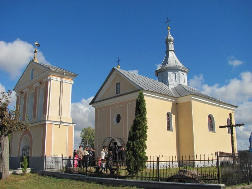 Церква Воздвиження Чесного Животворного Хреста, Городилів